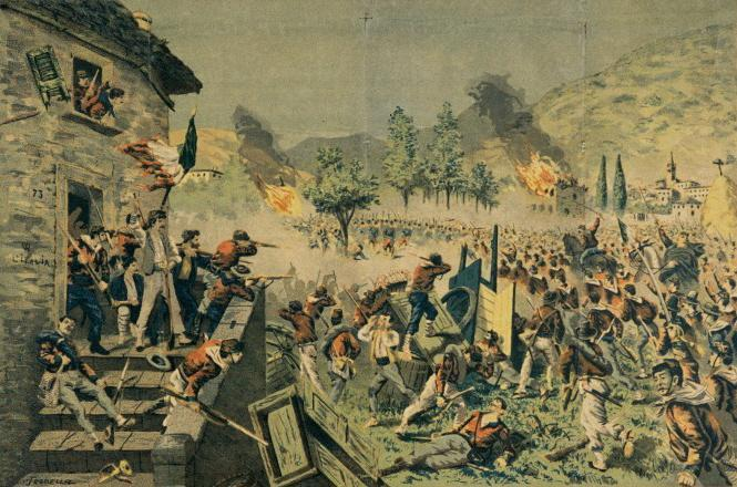 Archimede Tranzi, "Battaglia di Mentana", litografia acquerellata su carta.